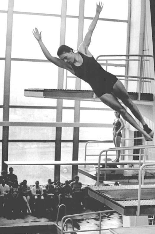 Christa Köhler ADN-ZB Gahlbeck 16.4.1972-hc- Leipzig: Hallentitel für Christa Köhler- Bei den DDR-Hallenmeisterschaften im Wasserspringen in Leipzig holte sich Christa Köhler (SC Empor Rostock) mit 401,60 Punkten am 16.4.1972 den Titel im Kunstspringen der Damen vom Drei-Meter-Brett (unser Foto)